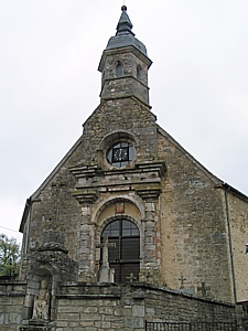 Église d'Outremécourt construite avec les matériaux provenants de La Mothe. (© Francis Montignon) GFDL Francis Montignon